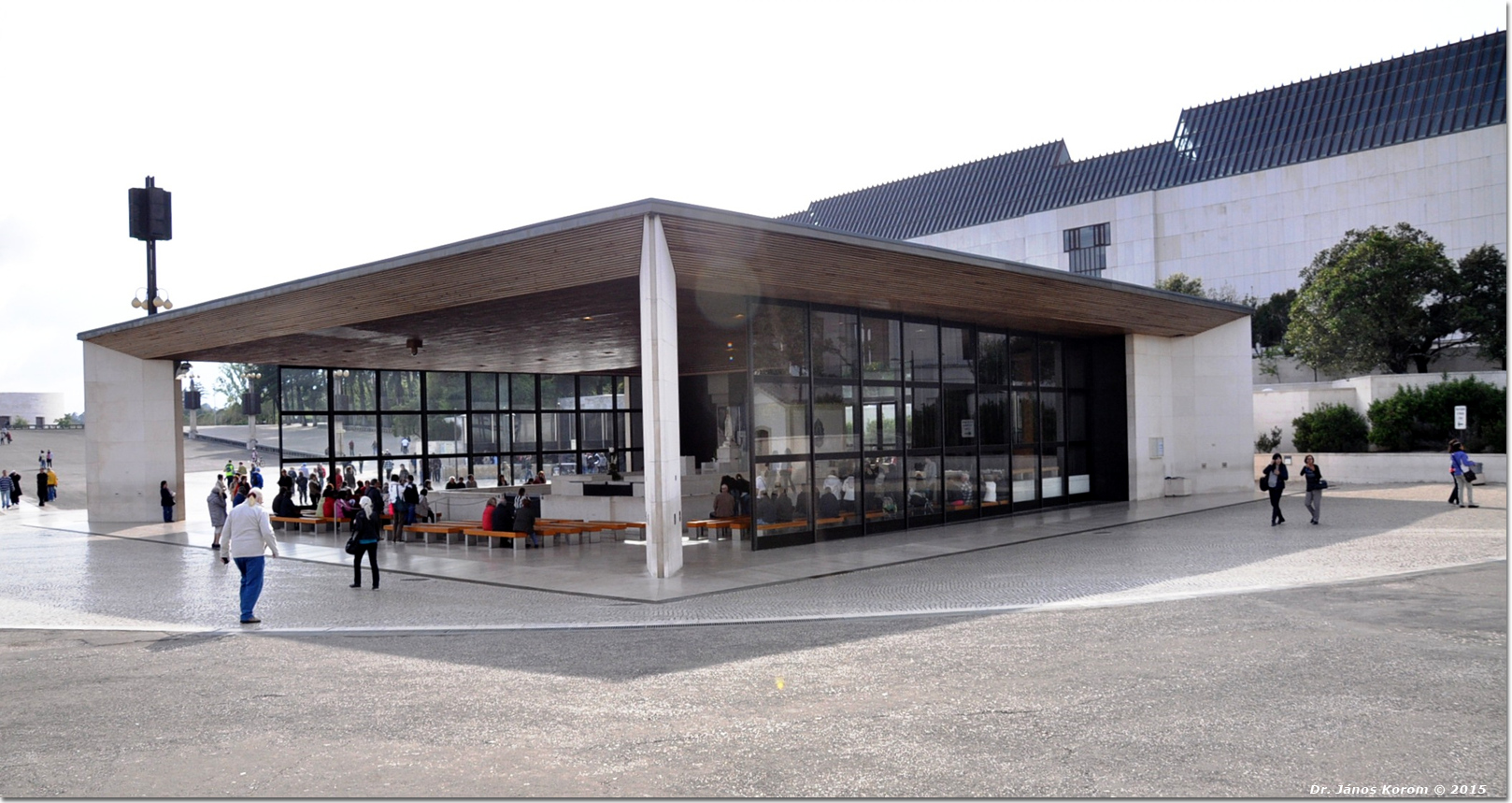 Das an der Erscheinungsstelle errichtete Kapellchen